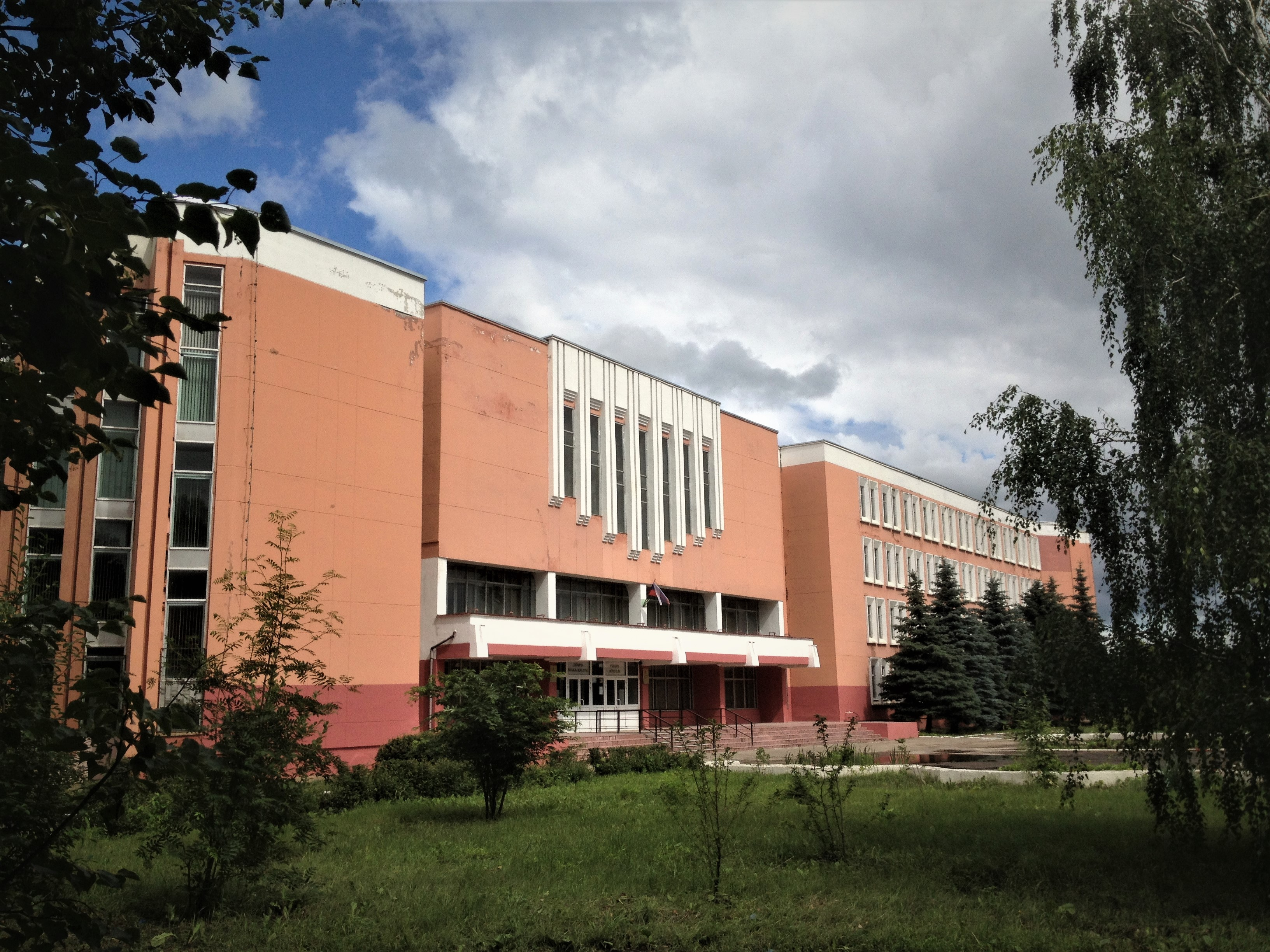 МБОУ «Лицей № 145» Авиастроительного района г. Казани (ул. Дементьева, д. 16).